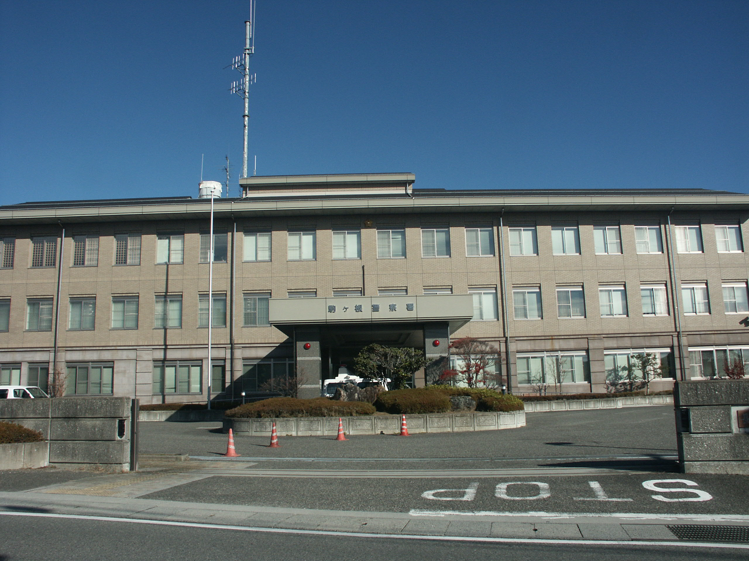 長野県警察駒ヶ根警察署庁舎